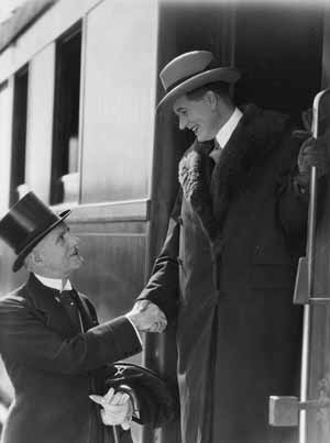 Henry Roussel (à gauche) et Albert Préjean (à droite) dans Les Nouveaux Messieurs, film de Jacques Feyder (1929)